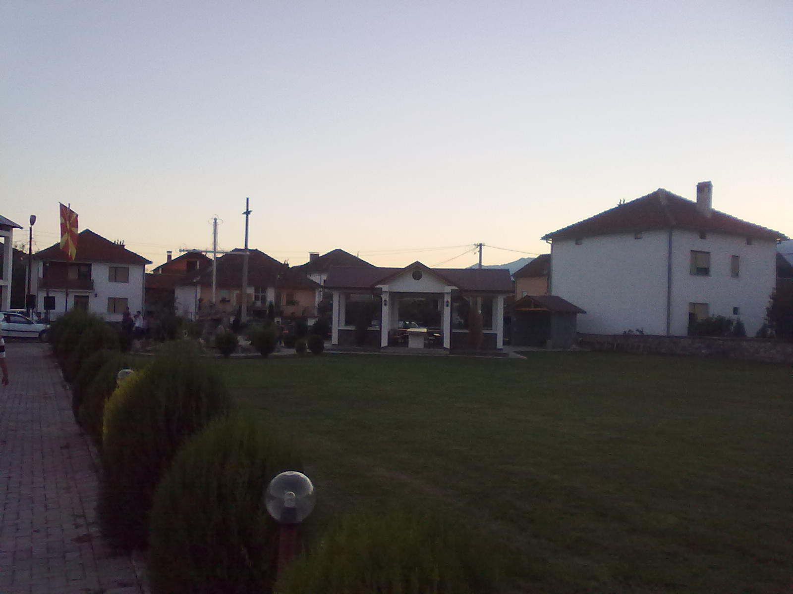 Дворот во црквата „Св. Богородица“ во Сараќино, Тетово.